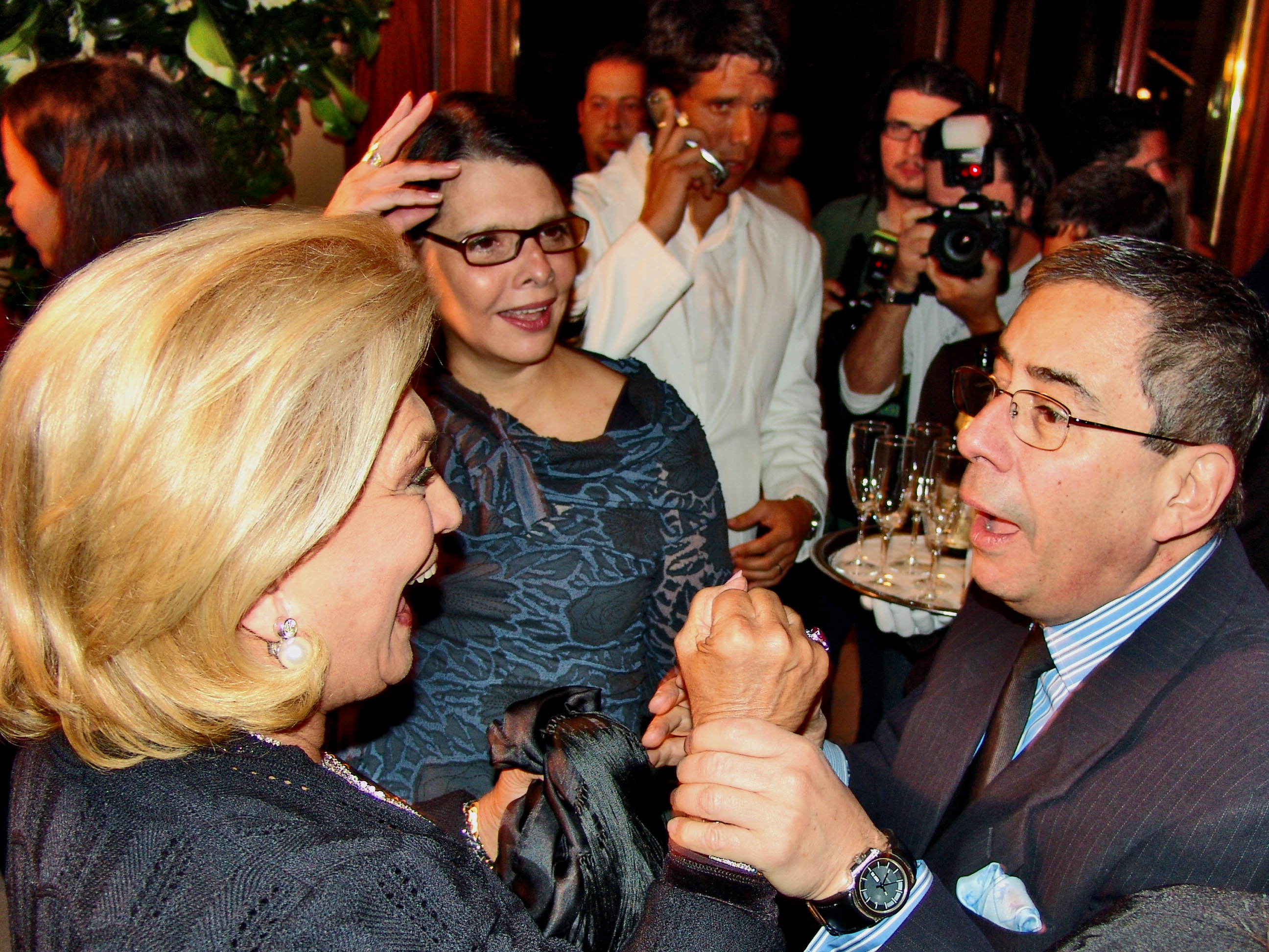 Jornalista brasileiro Paulo Henrique Amorim à direita juntamente com a apresentadora de TV brasileira Hebe Camargo. Ao fundo, também pode ser visto o ator e apresentador Márcio Garcia.